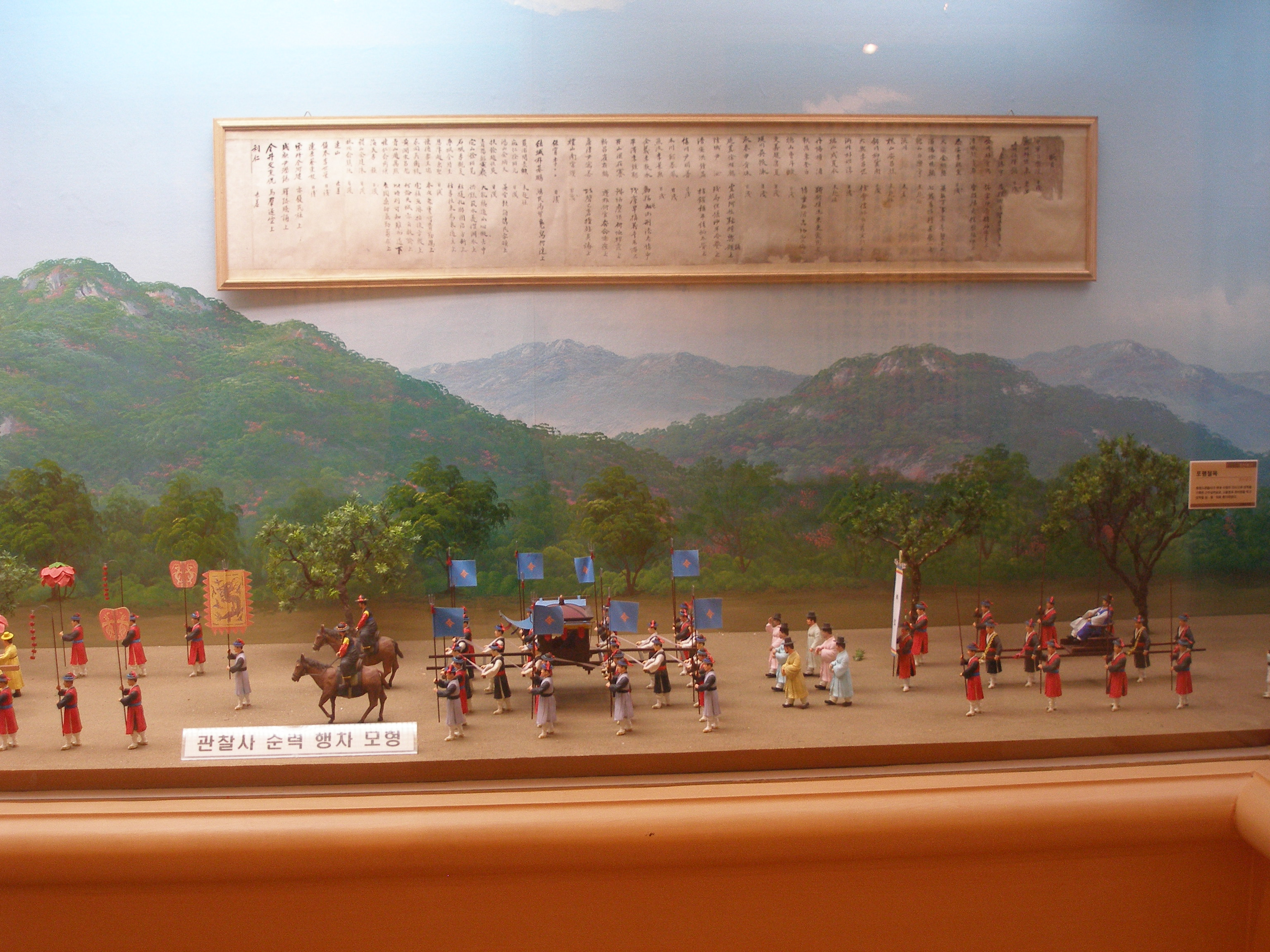 관찰사 시찰 모습 : 공주 충남역사박물관 전시품